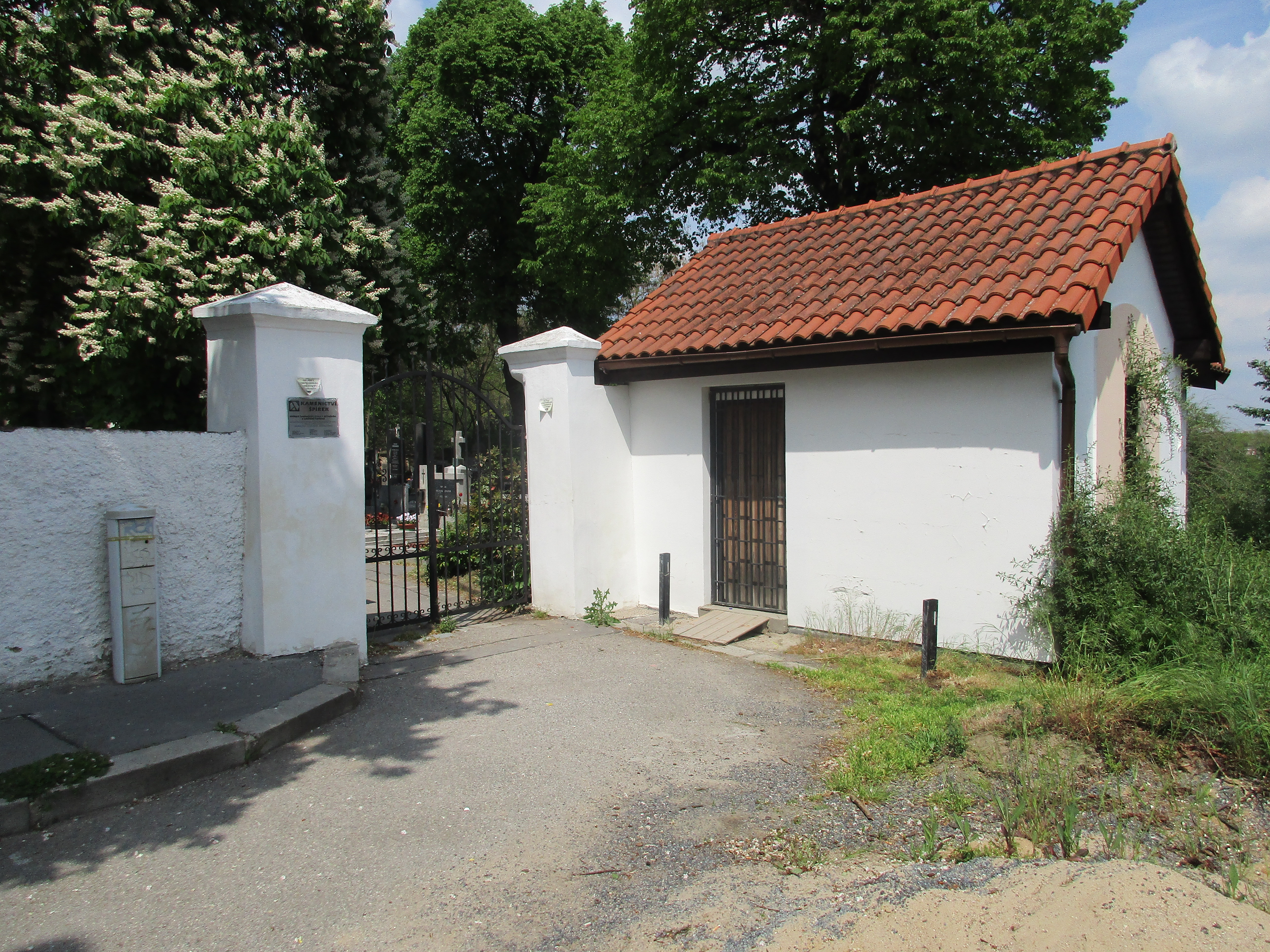 Hřbitov Stodůlky.